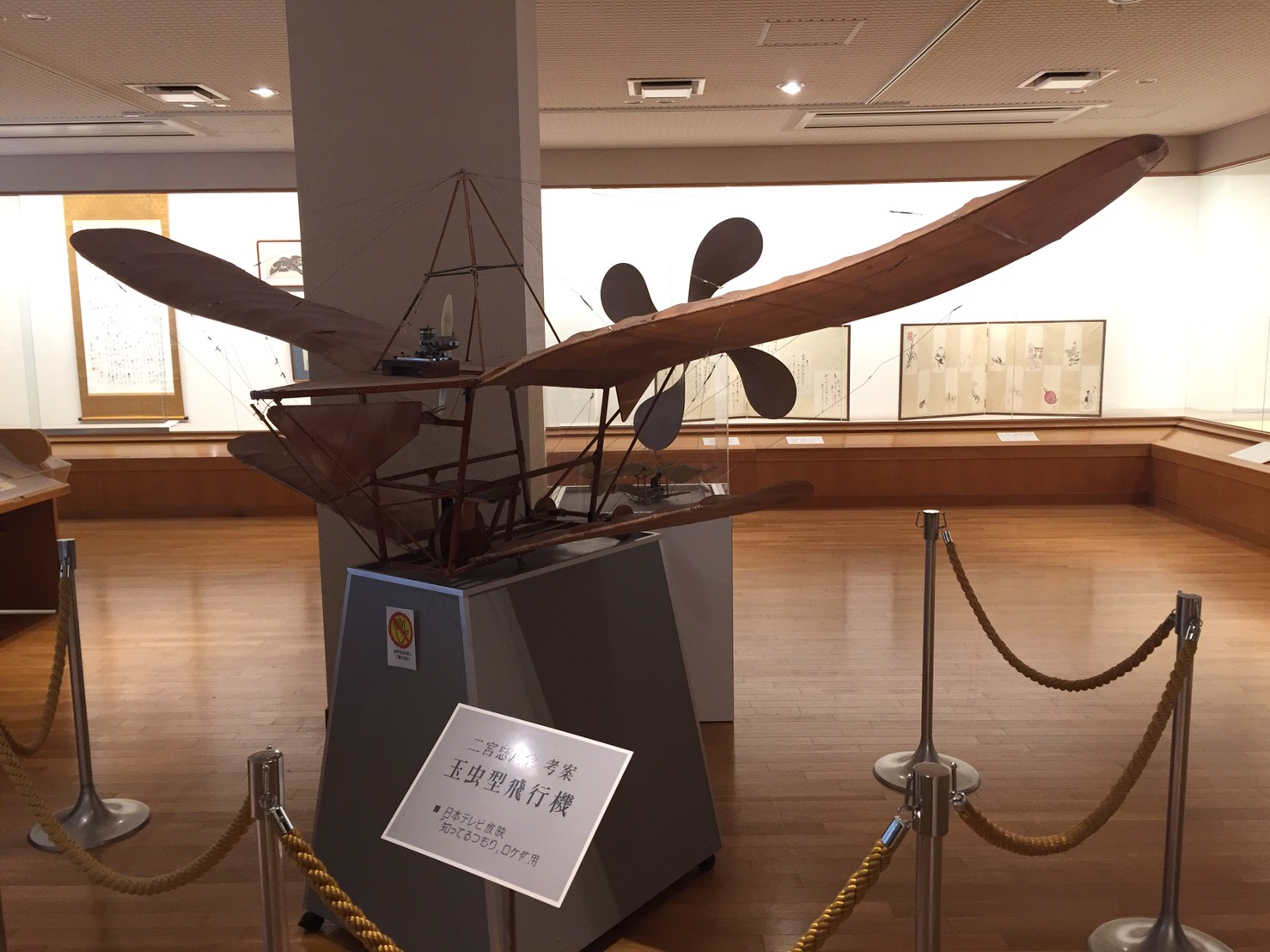 玉虫型飛行機を作成したが、友人飛行に必要な動力を確保できず、42歳の時、ライト兄弟に先を越され飛行機開発を断念する。